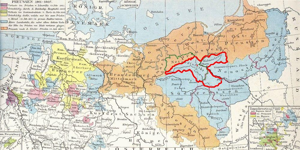 Departament Bydgoski i Obwód Nadnotecki na mapie Prus 1806-1810 r. z atlasu Williama R. Shepharda (1923 r.)